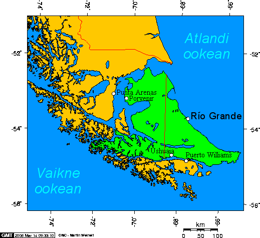 Tulemaa saar